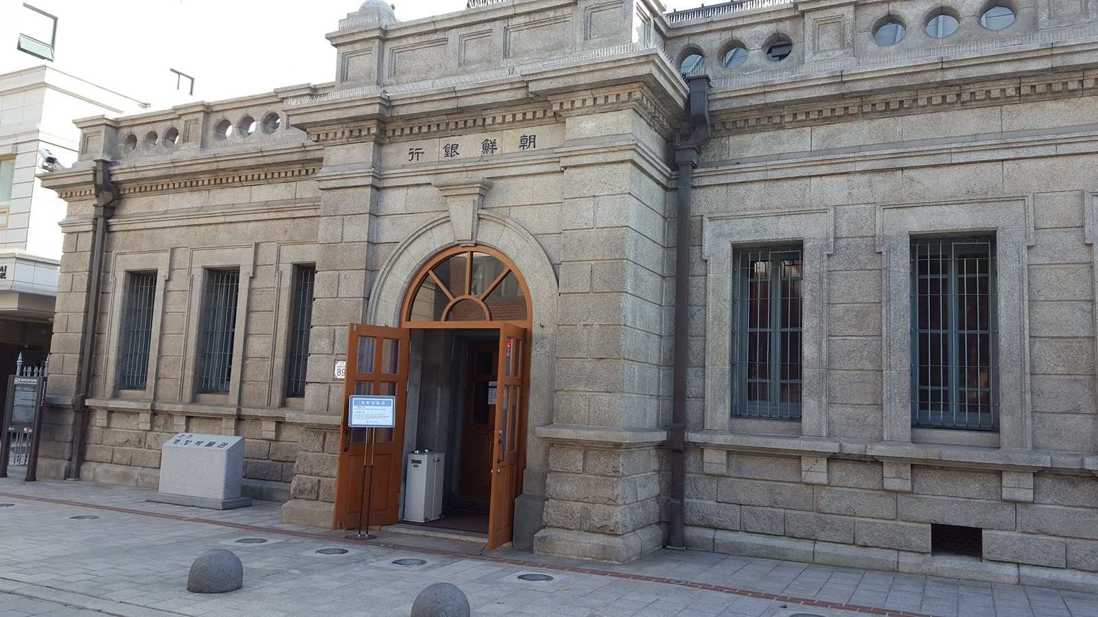 201609 구인천일본제일은행지점